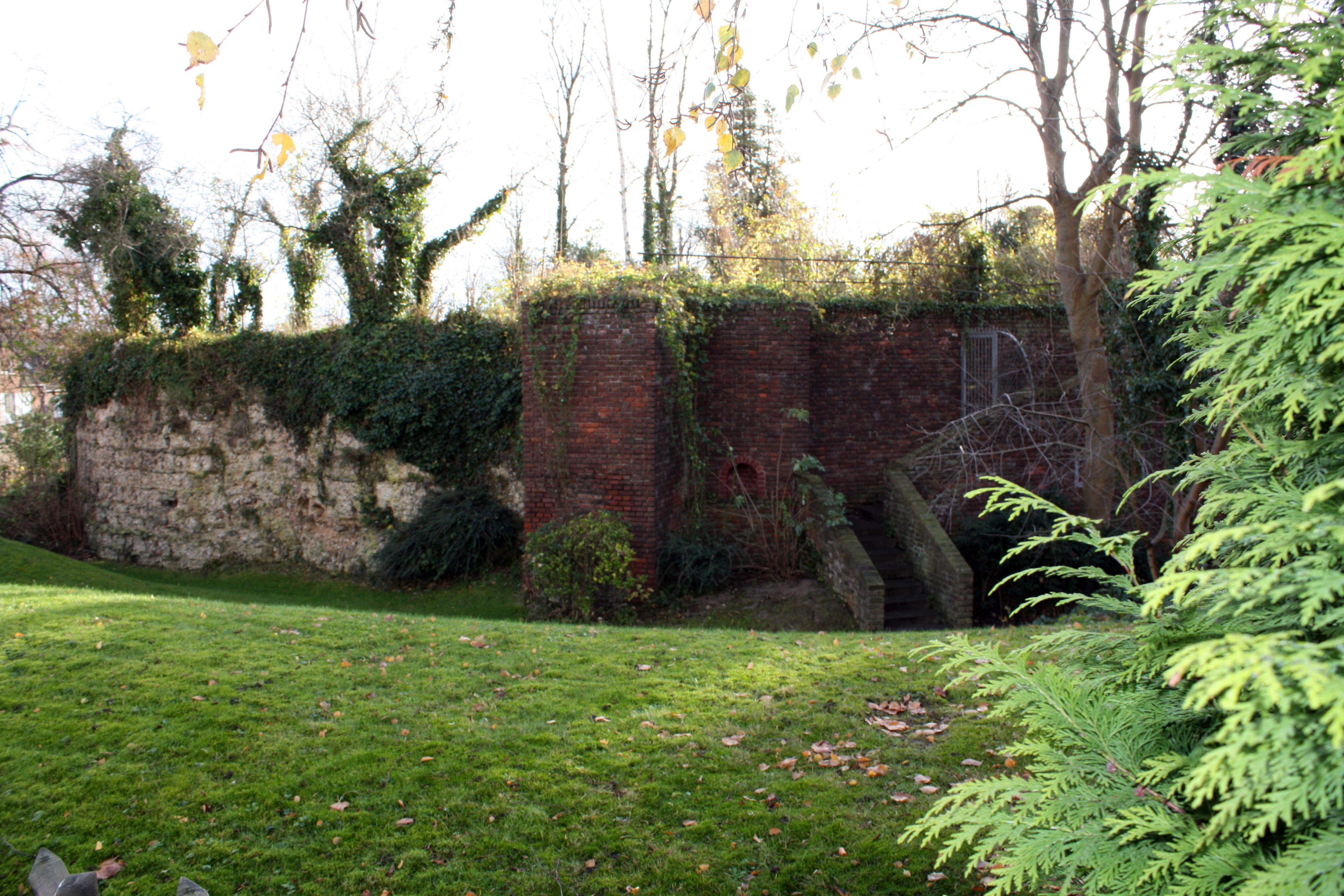 Hürth-Fischenich, Burgruine Augustinerstraße